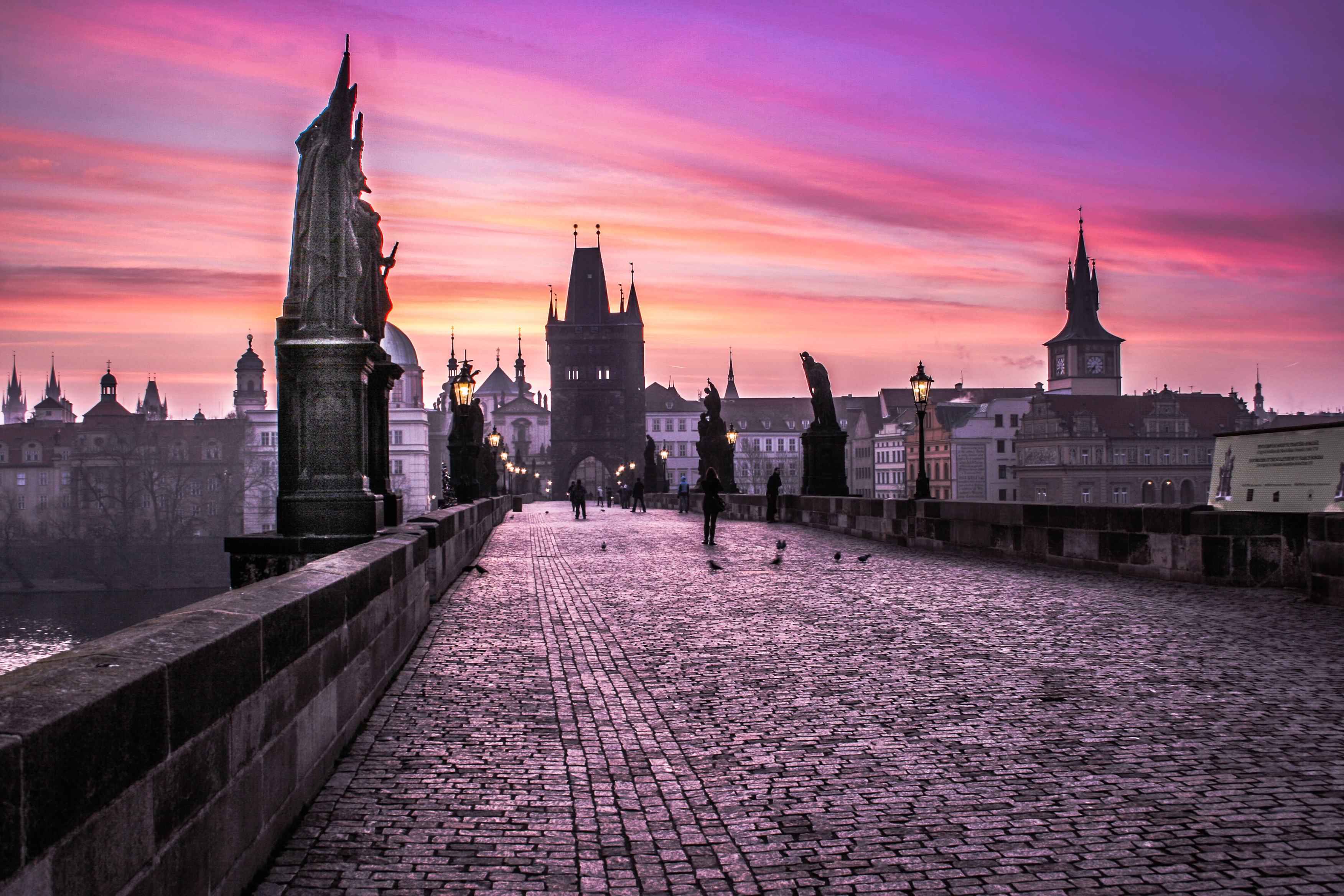 Karlův Most svítání v létě 2015